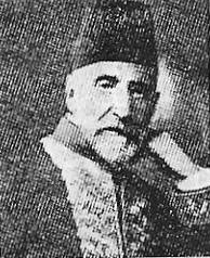 חיים ולירו